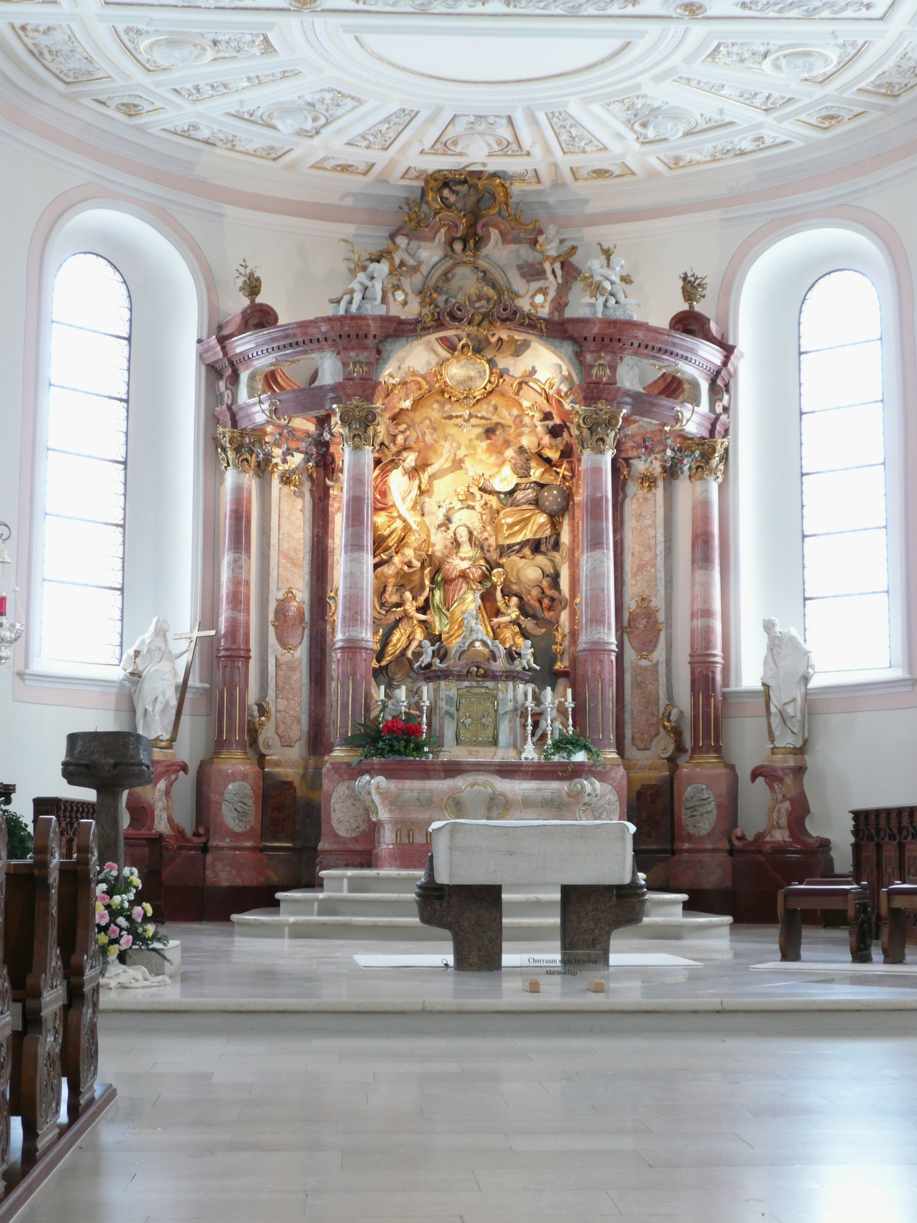 Dreifaltigkeitskirche on Dreifaltigkeitsberg near Spaichingen, interior